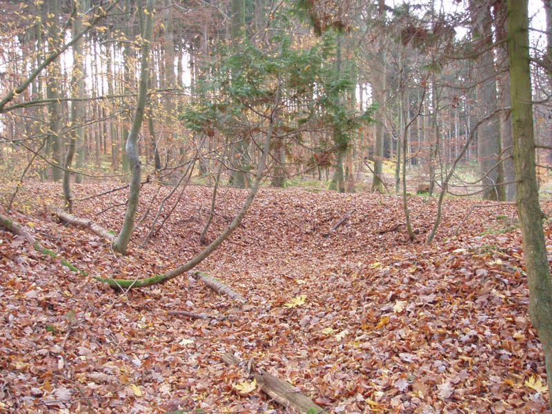 Überrest eines Hügelgrabs im Stadtwald von Heilbronn unterhalb des Schweinsbergs